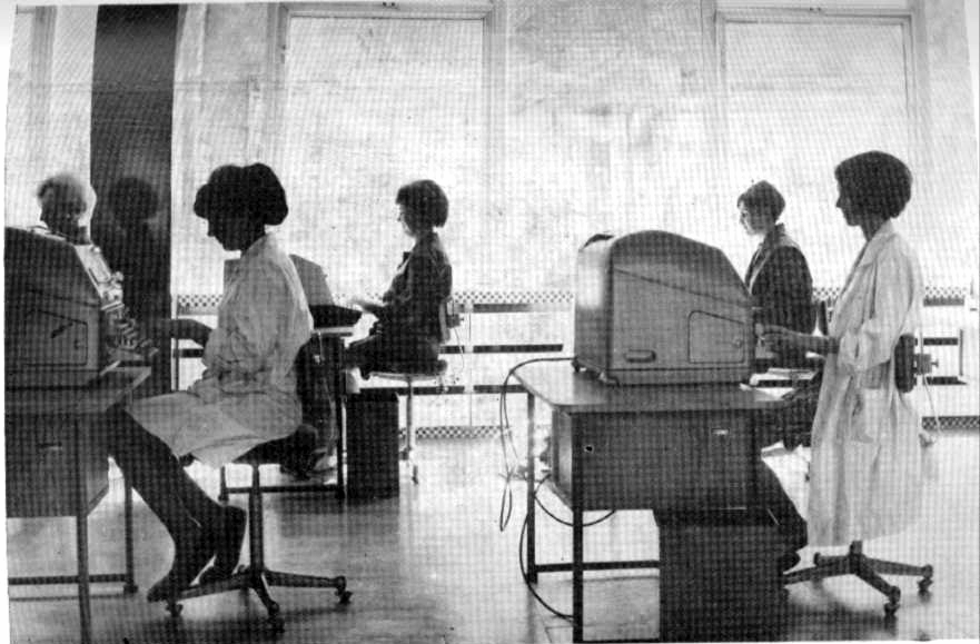 ZETO - Wrocław, sala przygotowywania danych